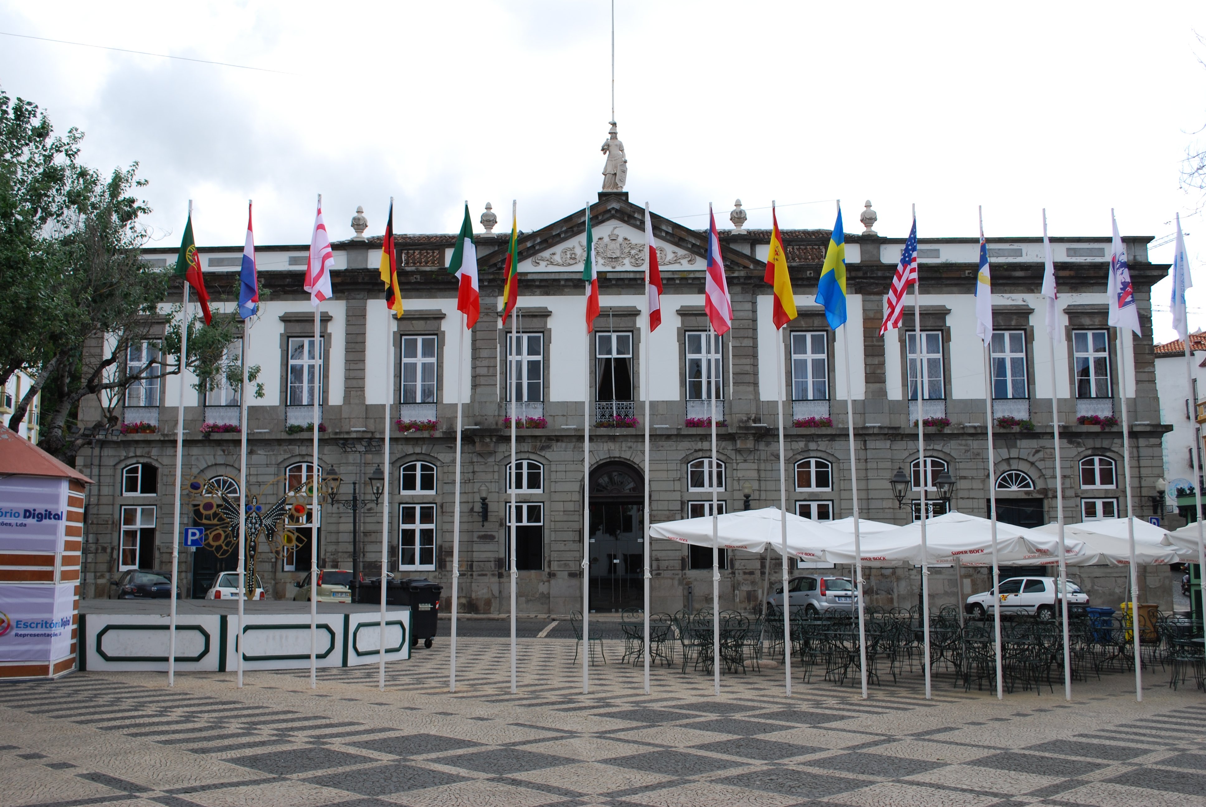 Paços do Concelho de Angra do Heroísmo, na Praça Velha.